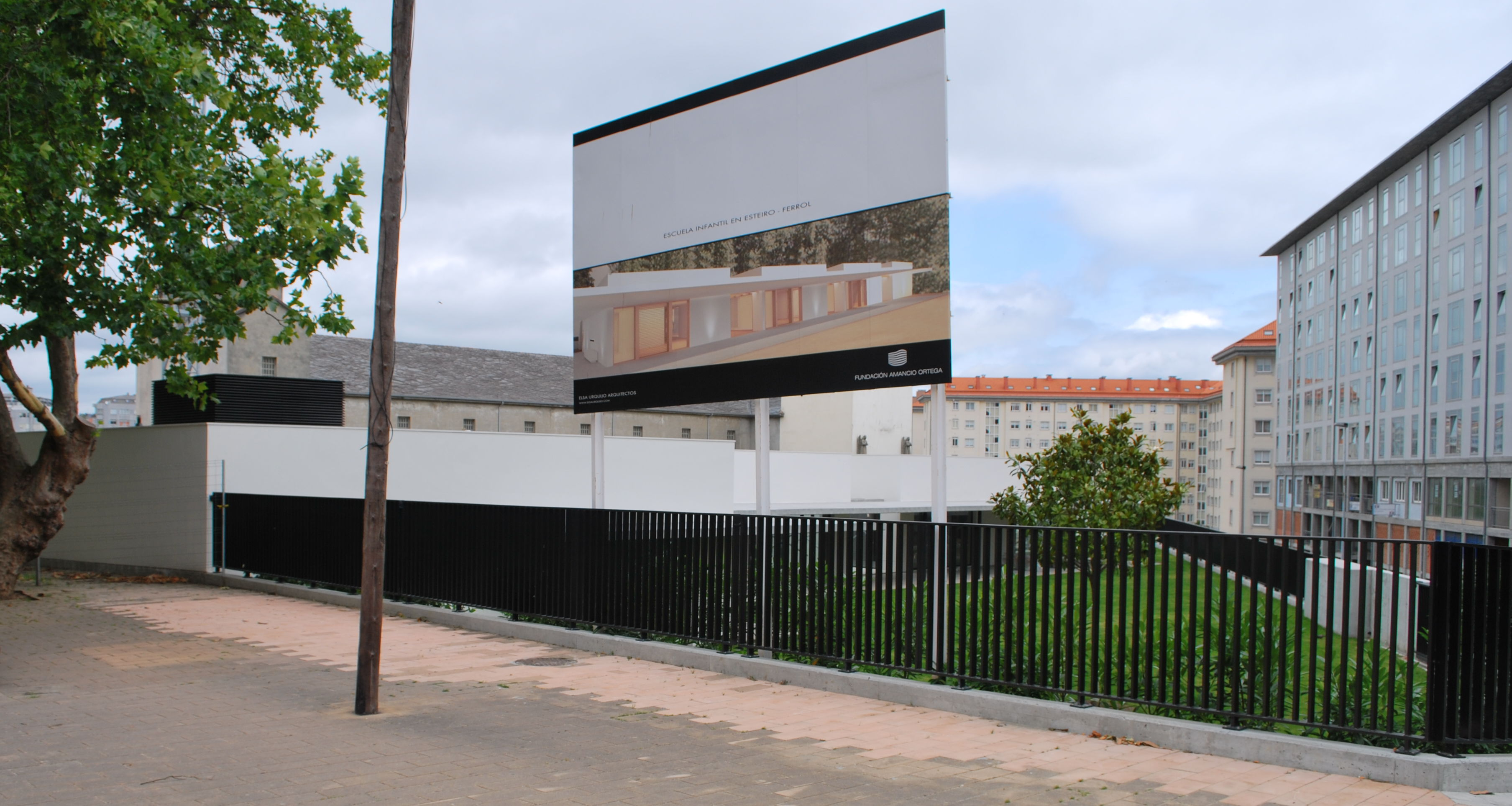 Escola infantil de Esteiro, ferrol. Fundación Amancio Ortega